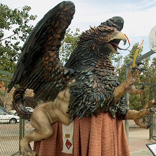 El Griu d'Artesa de Lleida al Bestiuari del 2007